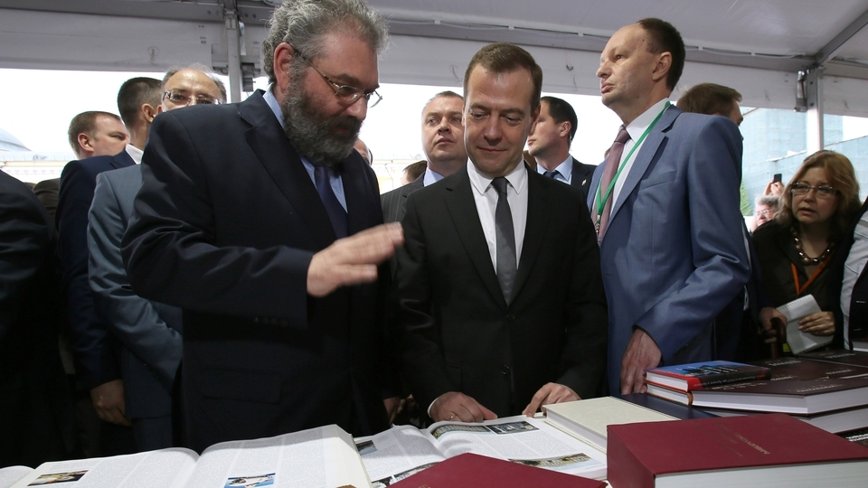 Сергей Кравец представляет премьер-министру РФ Дмитрию Медведеву Большую российскую энциклопедию. Книжный фестиваль «Красная площадь», 3 июня 2016.